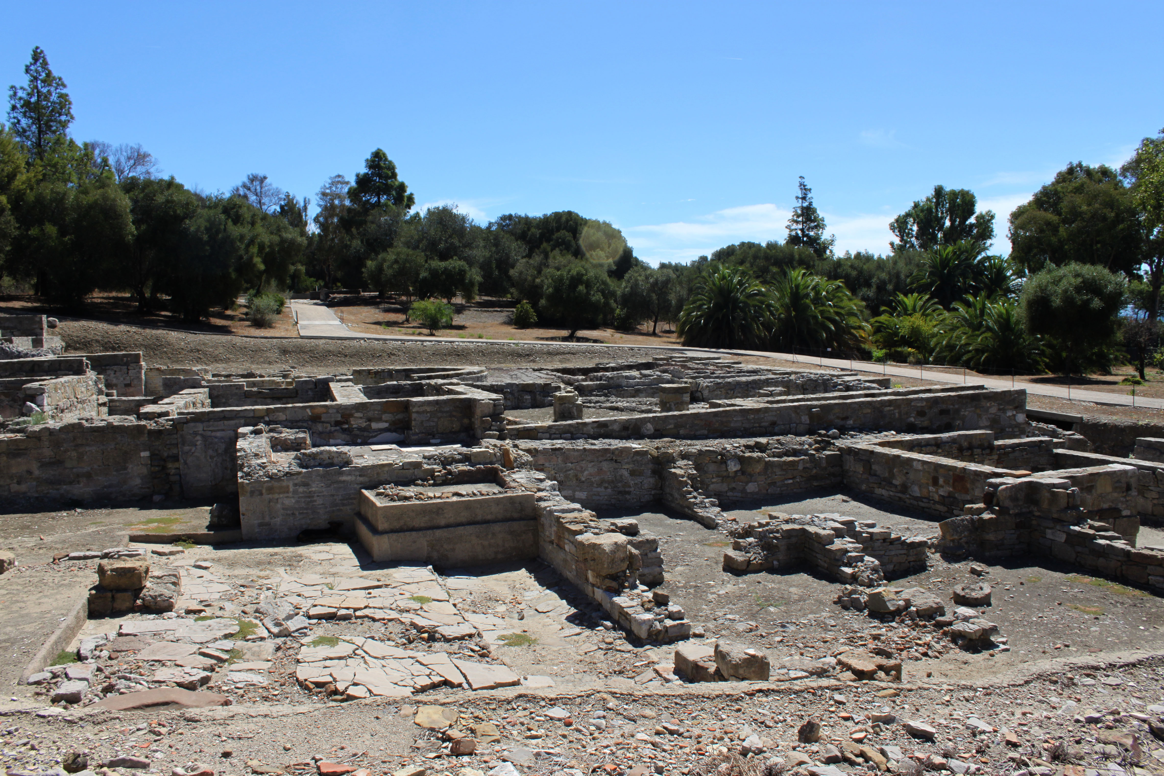 Estructuras visibles de las Termas del yacimiento romano de Carteia. San Roque, Andalucía, España.